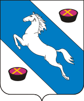 Герб Белореченского городского поселения